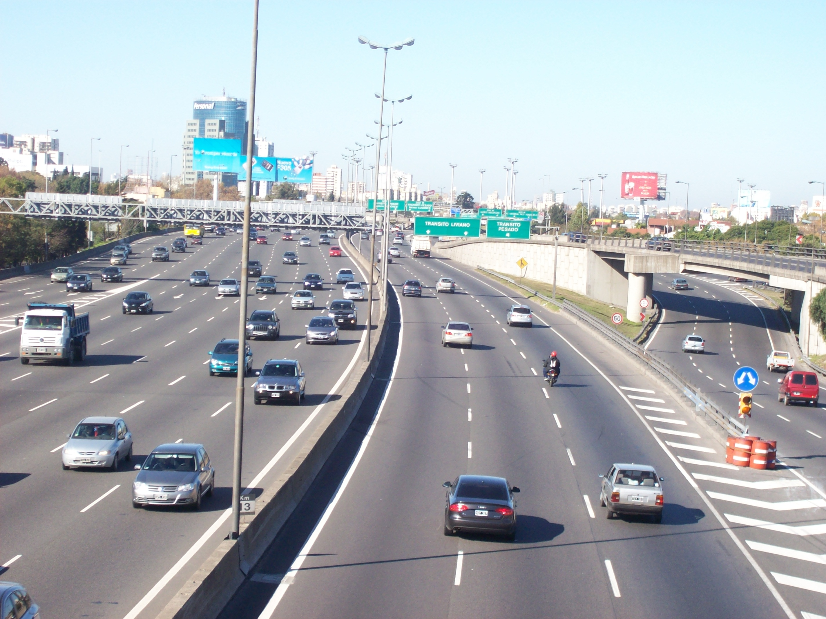 Acceso Norte desde el puente de la calle Melo hacia el sudeste en Florida, partido de Vicente López, Provincia de Buenos Aires, Argentina. Éste es el último puente antes de la Avenida General Paz, viniendo desde el norte.